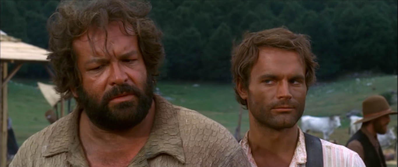 Schermata del film Lo chiamavano Trinità